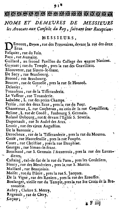 Exemple d'une page de l'Almanach royal, édité et imprimé par Laurent d'Houry, Paris, 1720